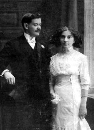 Vlasta Javořická (1890 - 1979), Česká spisovatelka.